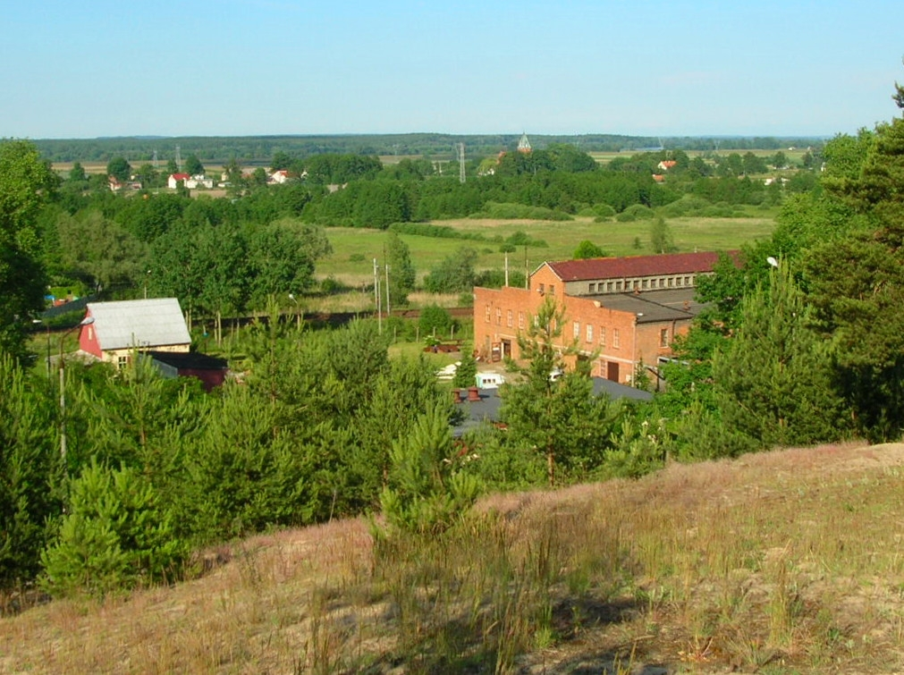 Widok ze Zbocza Łęgnowskiego w Bydgoszczy